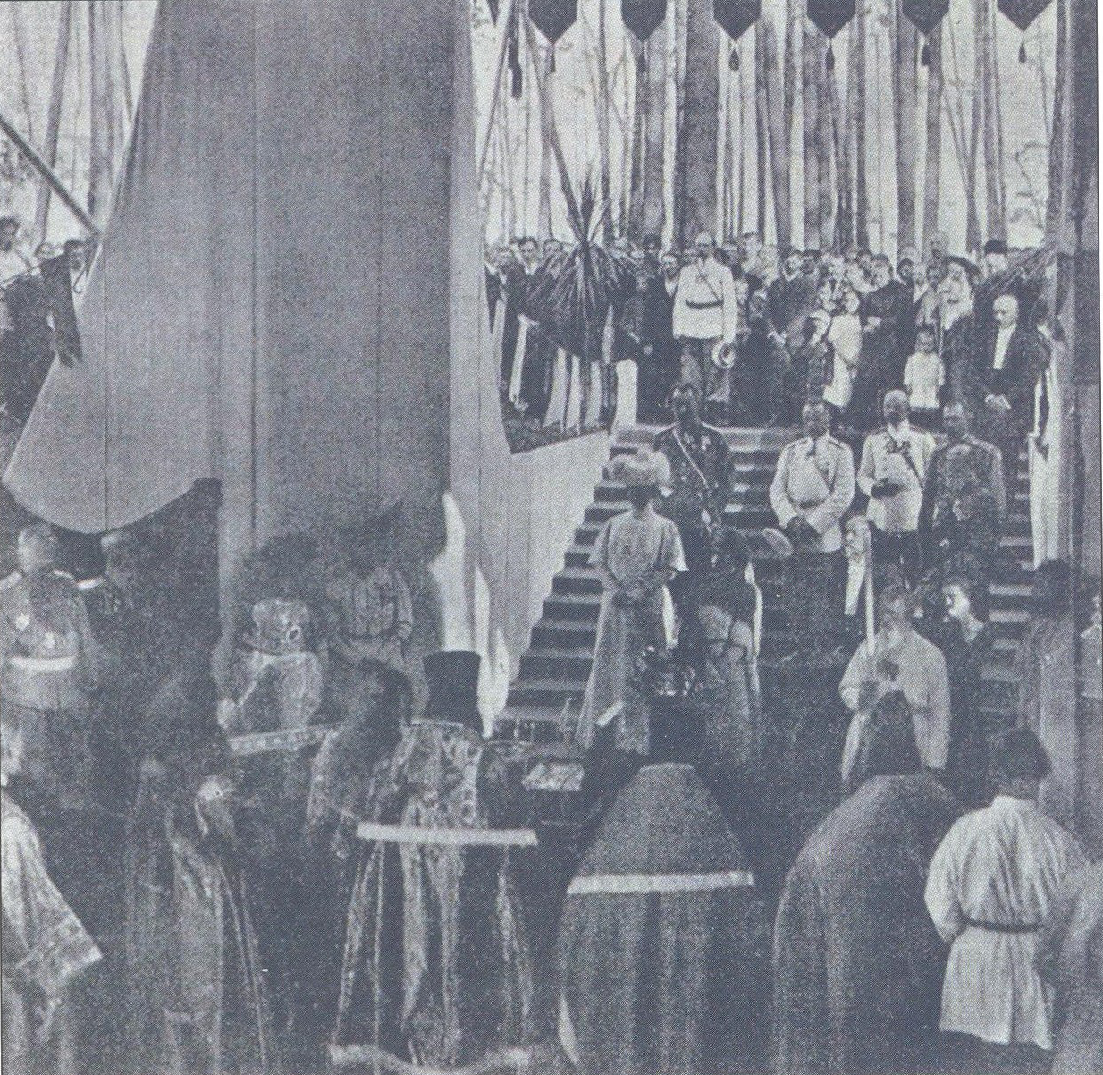 Закладка Сергиево-Елизаветинского убежища 5 июля 1907 года.